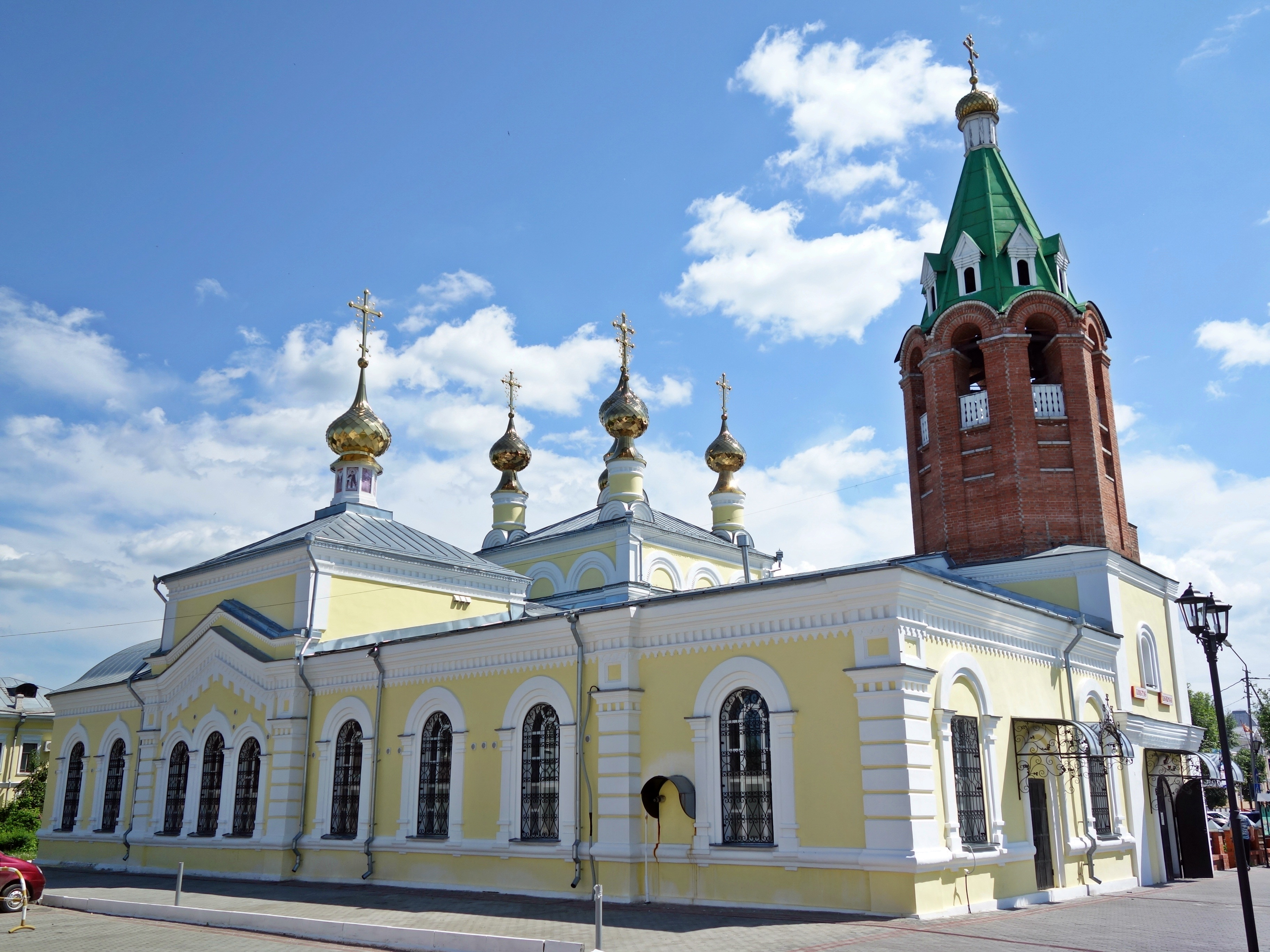 Церковь Вознесения: улица Московская, 15а, Муром, Владимирская область